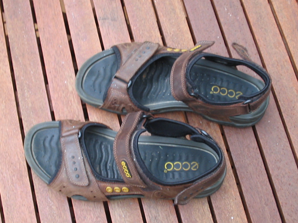 sandalen Ecco